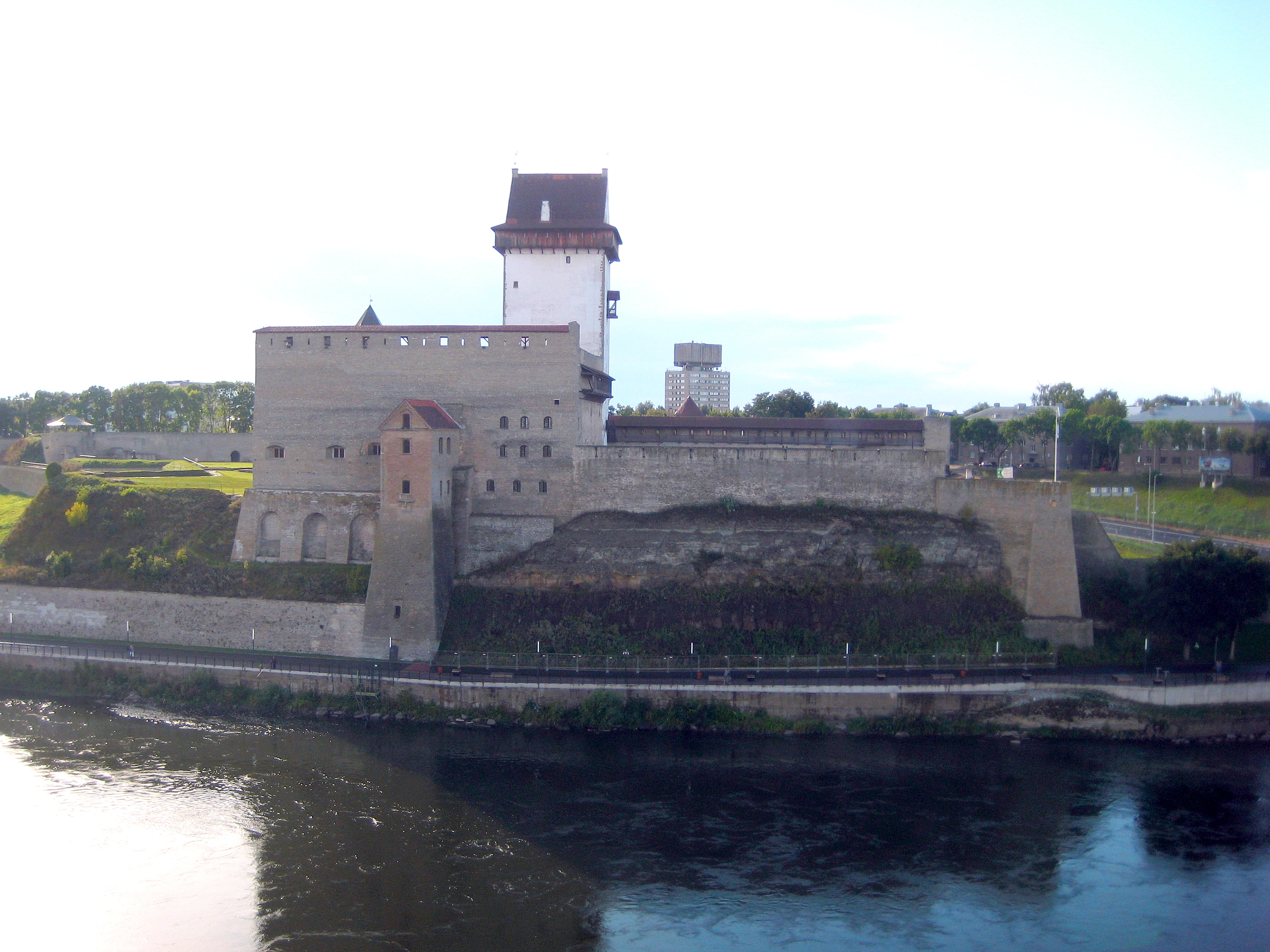 Нарва. Замок Германа и башня Длинный Герман